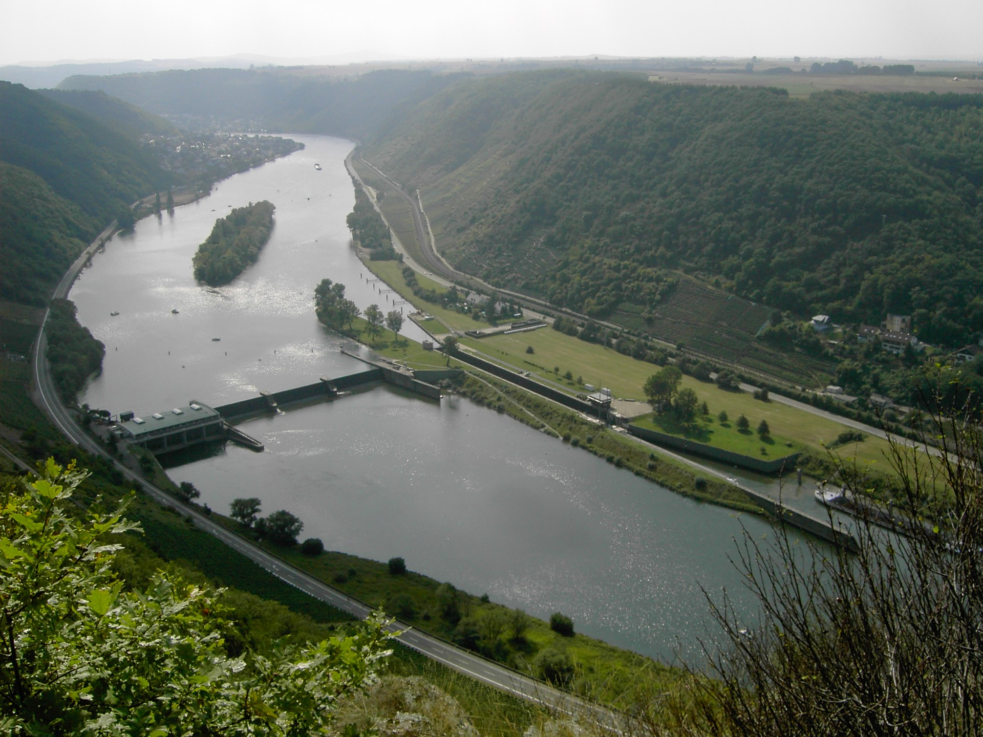 Staustufe Lehmen, fotografiert von der Niederfeller Kahllay aus. Im Hintergrund in der Mosel das Naturschutzgebiet „Reiherschussinsel bei Lehmen“